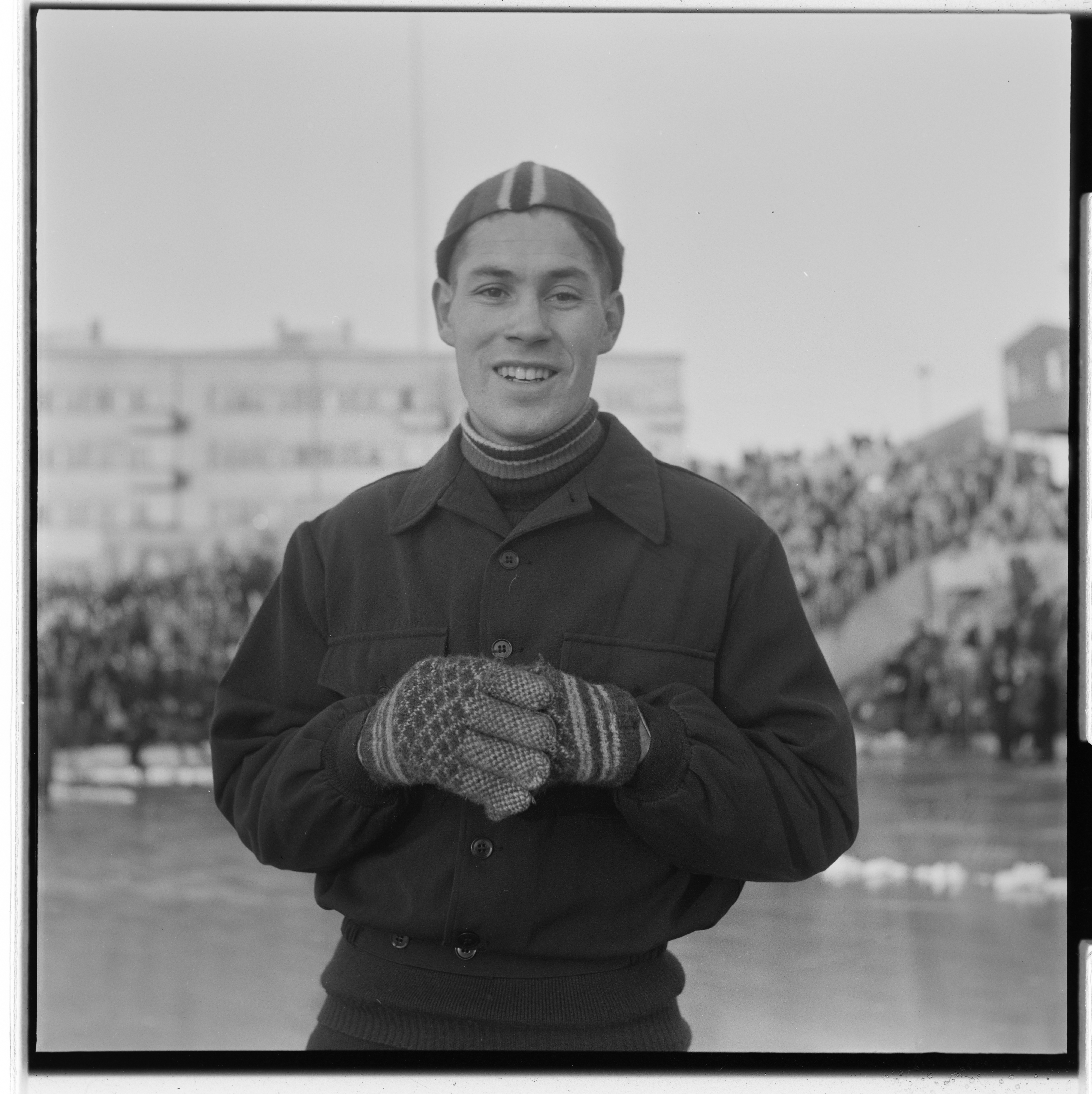 Bildet er hentet fra Arkivverket. Skøyteløp på Bislet. NÅ nr. 1, 1955 Arkivinstitusjon : Riksarkivet Arkivnavn : Billedbladet NÅ Sted : Norge, Oslo, Oslo, Bislett Emneord: Bislet, Menn, Kvinner, Barn, Skøyter Avbildet